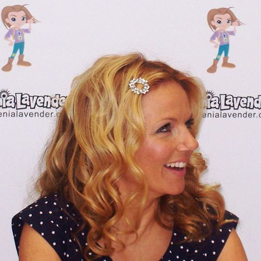 Geri Halliwell gyermekkönyvét dedikálja a Milton Keynes-i ASDA áruházban 2008. május 3-án.